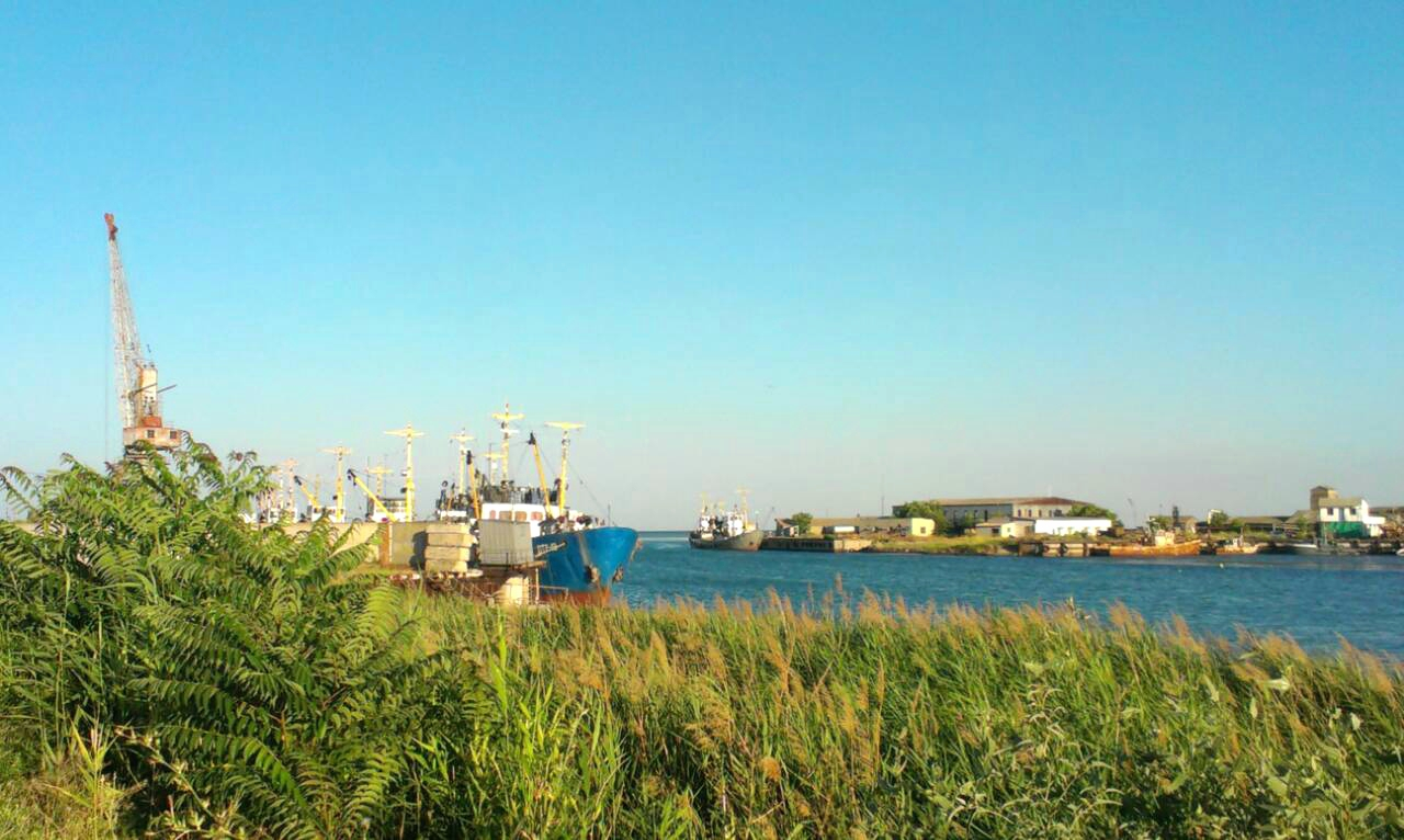 Генический порт